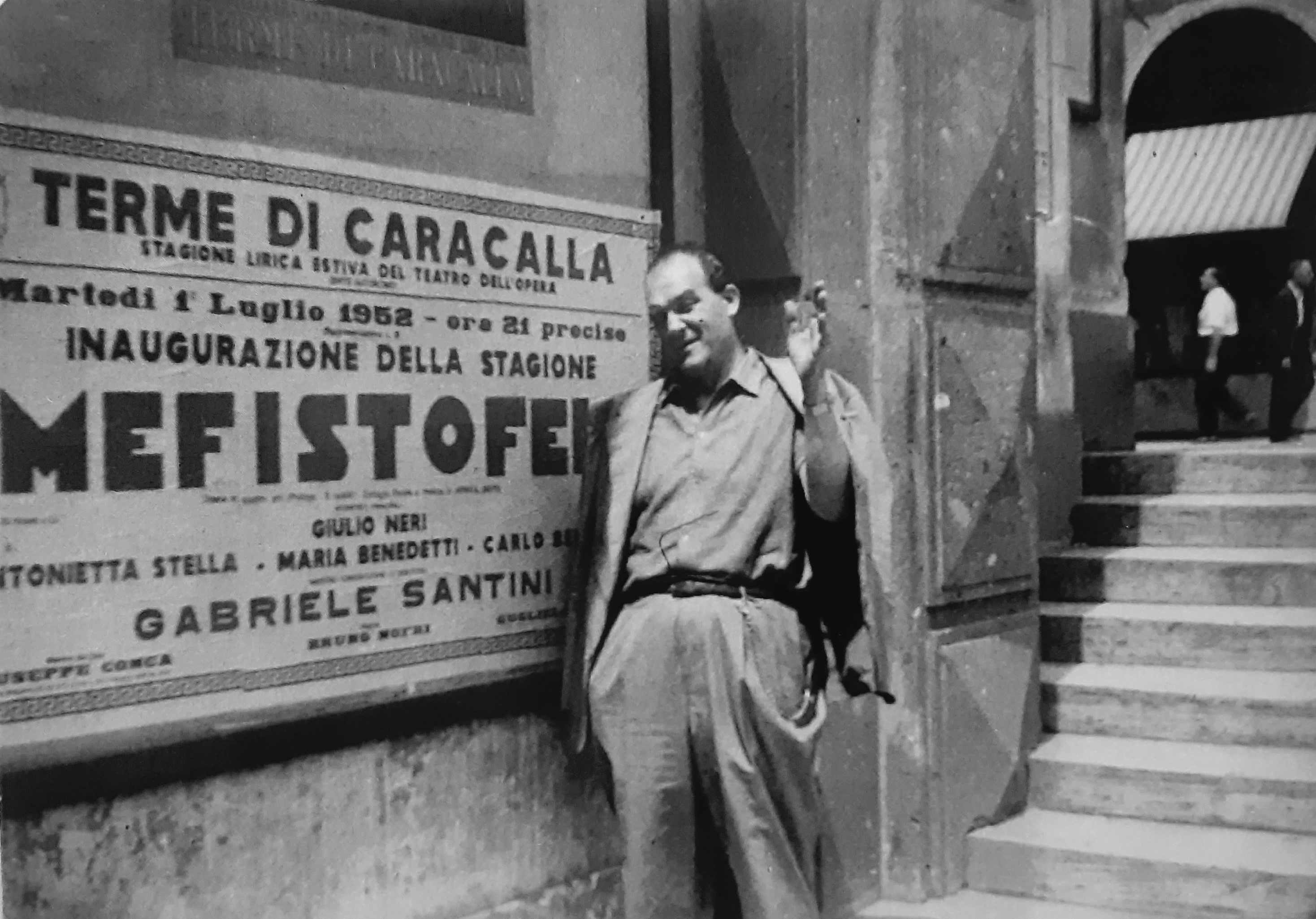 Giulio Neri di fronte al manifesto per una edizione del Mefistofele alle Terme di Caracalla nel 1952